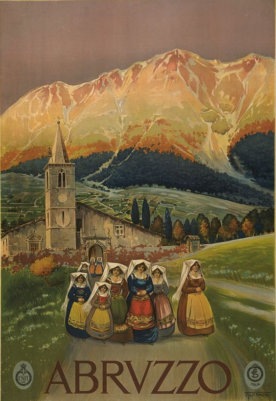 Poster della Majella vista da Campo di Giove (opera di Vincenzo Alicandri)